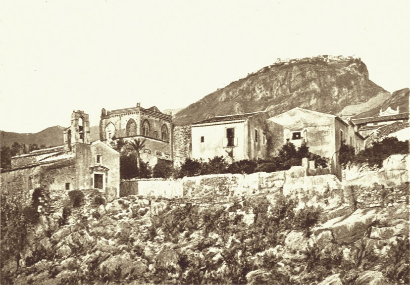 Giuseppe Bruno (1836-1904) - Taormina: La chiesetta di S. Michele e il palazzo dei duchi di Santo Stefano. Sullo sfondo, Castelmola. Ca. 1885-90.